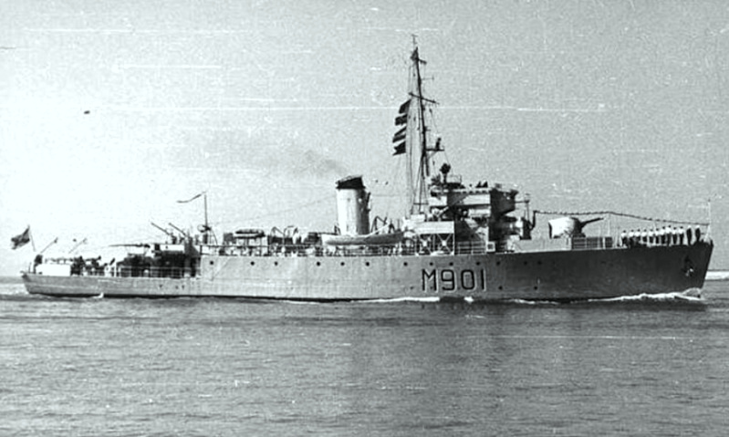 Le M901 Georges Lecointe (I) de la Force Navale (Belgique) : ex-HMS Cadmus (J230)